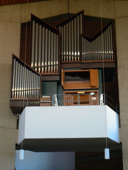 Prospektansicht der Orgel der ev-luth. Auferstehungskirche in Hannover, gebaut von der Werkstatt Gebrüder Hillebrand.